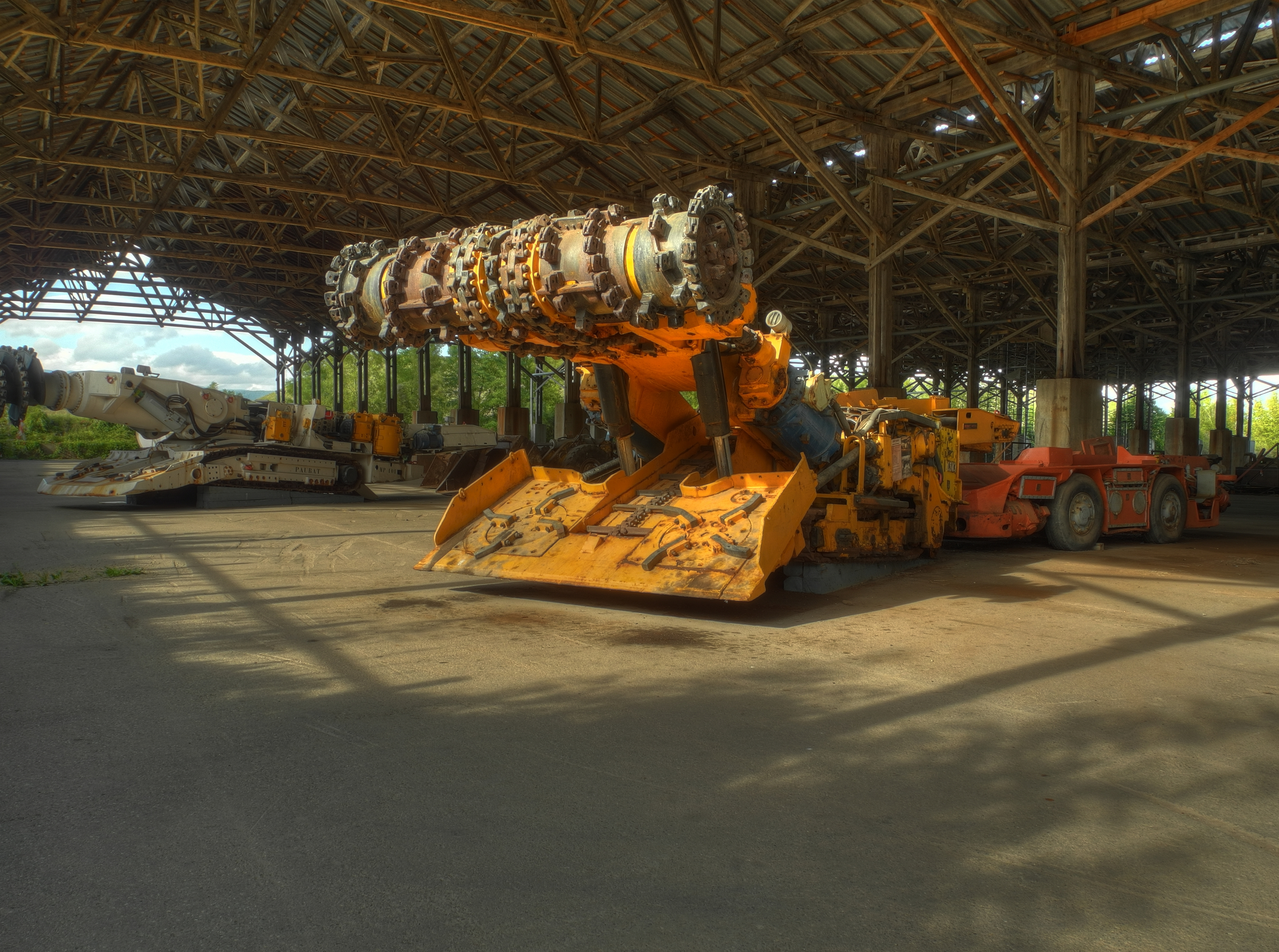 Puits Rodolphe : une des machines servant à extraire la potasse (HDR).